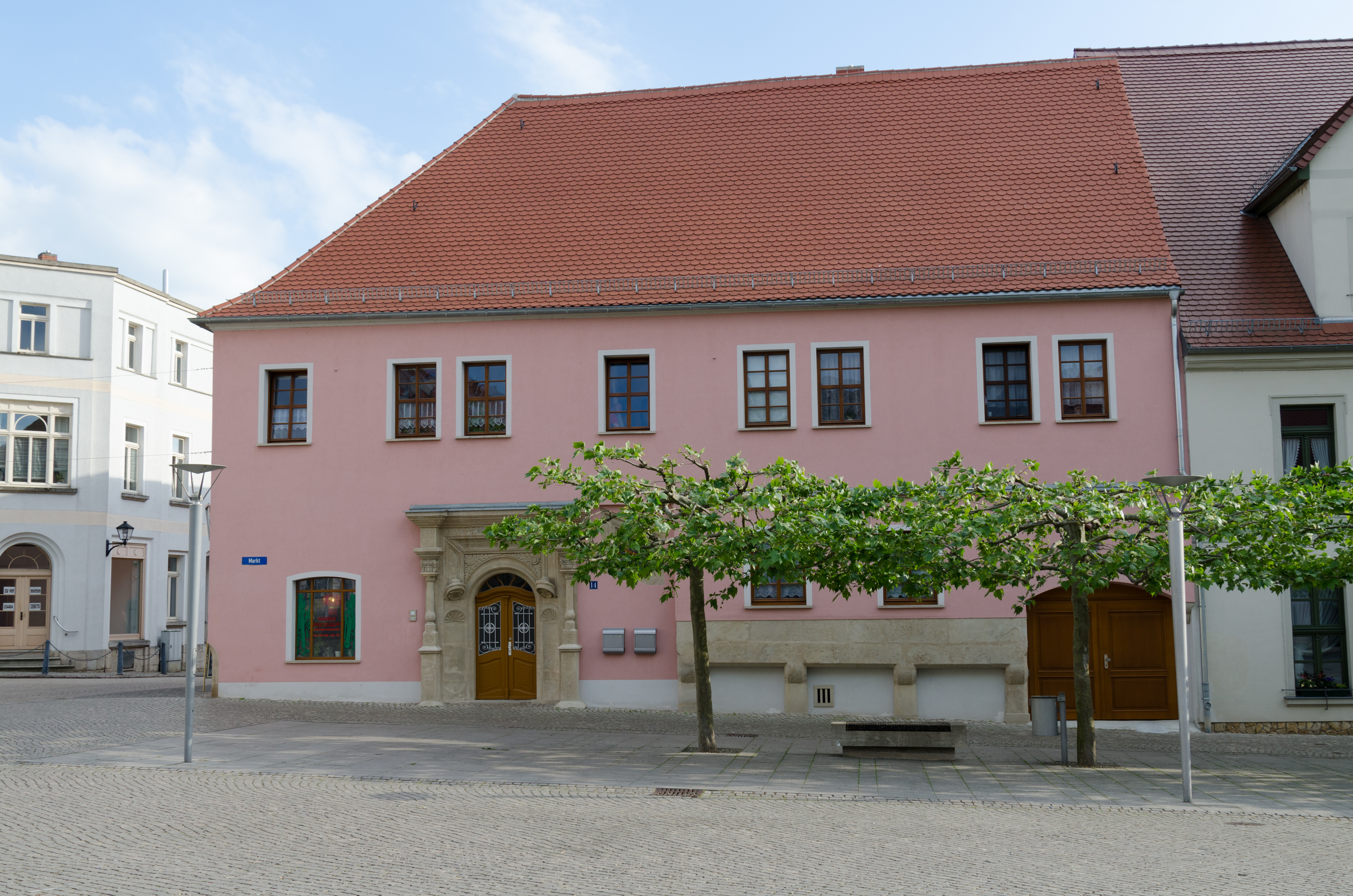 Freyburg an der Unstrut, Markt 14